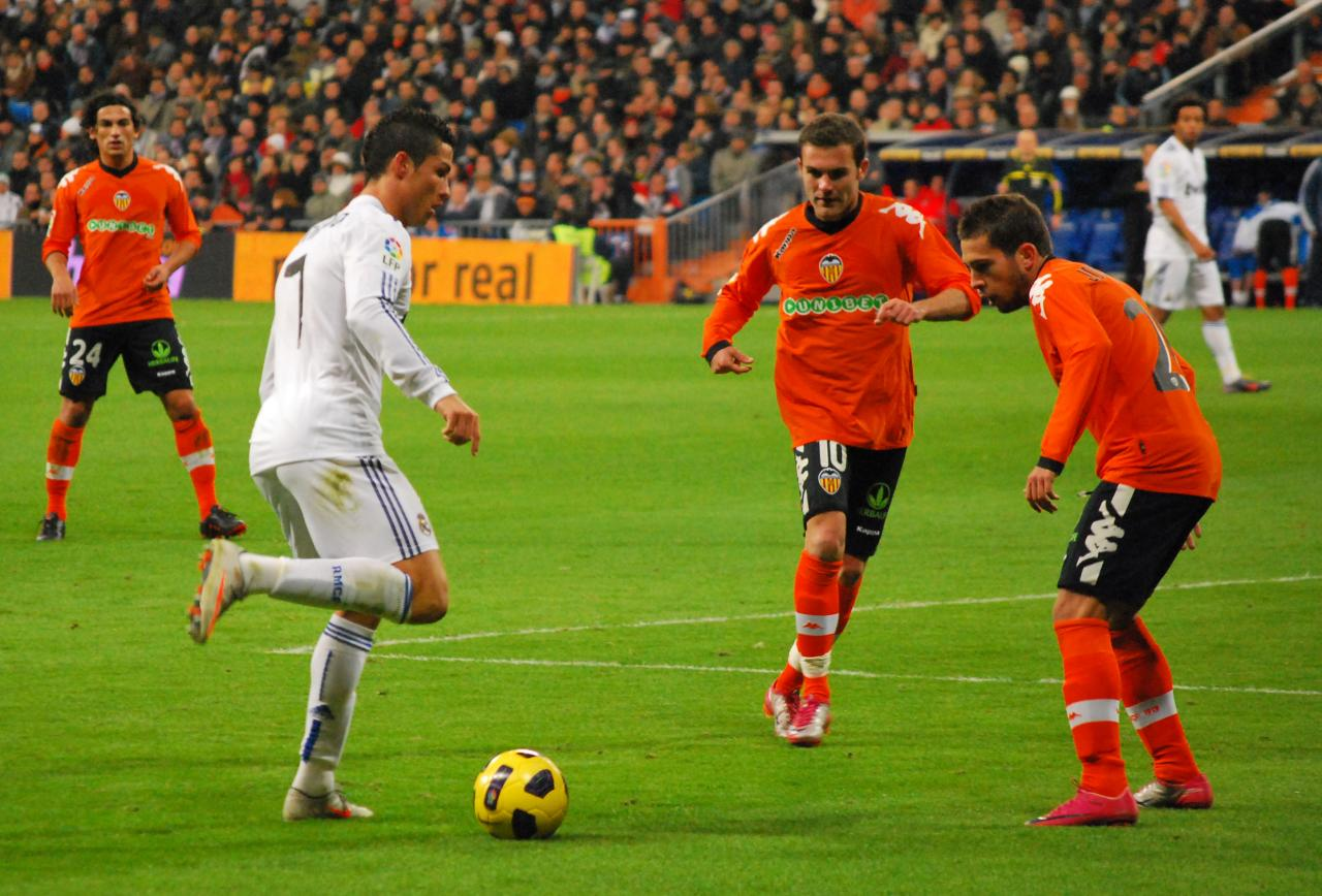 La Liga 4 de Diciembre 2010 Real Madrid 2 - Valencia 0